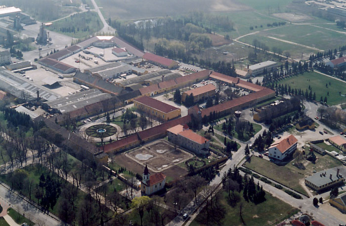 Állami gazdaság - Bábolna - Hungary - Europe